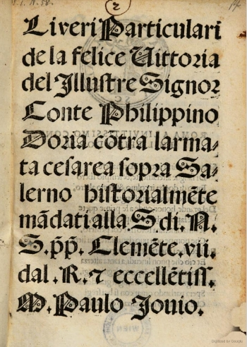 Paulus Iovius, Veri particulari (1528) title page